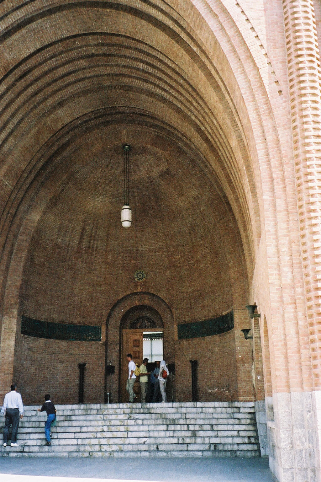 Entrée du Musée National (Musée des antiquités) à Téhéran. La voute imite le style des voutes Sassanides. Photo prise en août 2001 M. Benoist